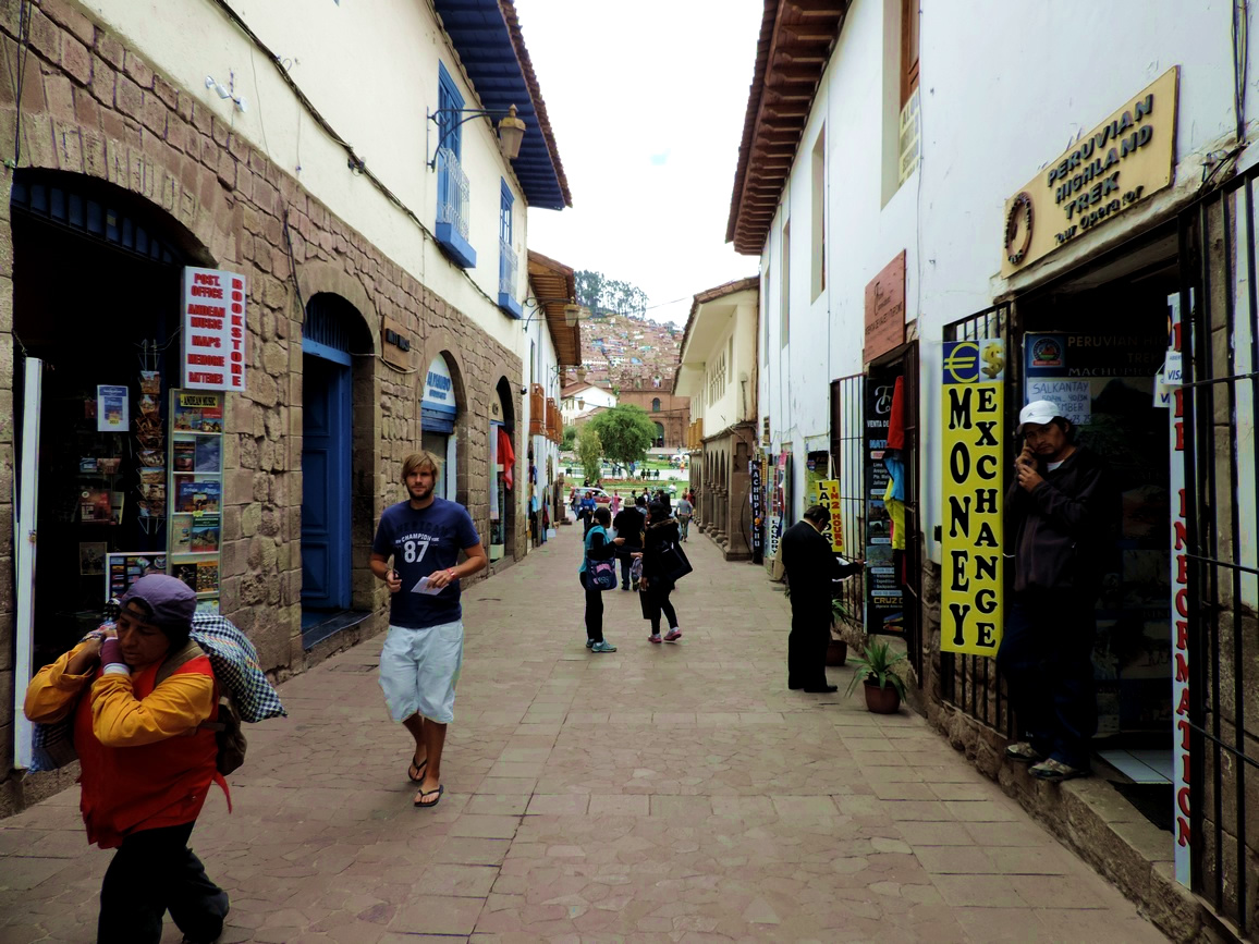 Cuzco (Peru)